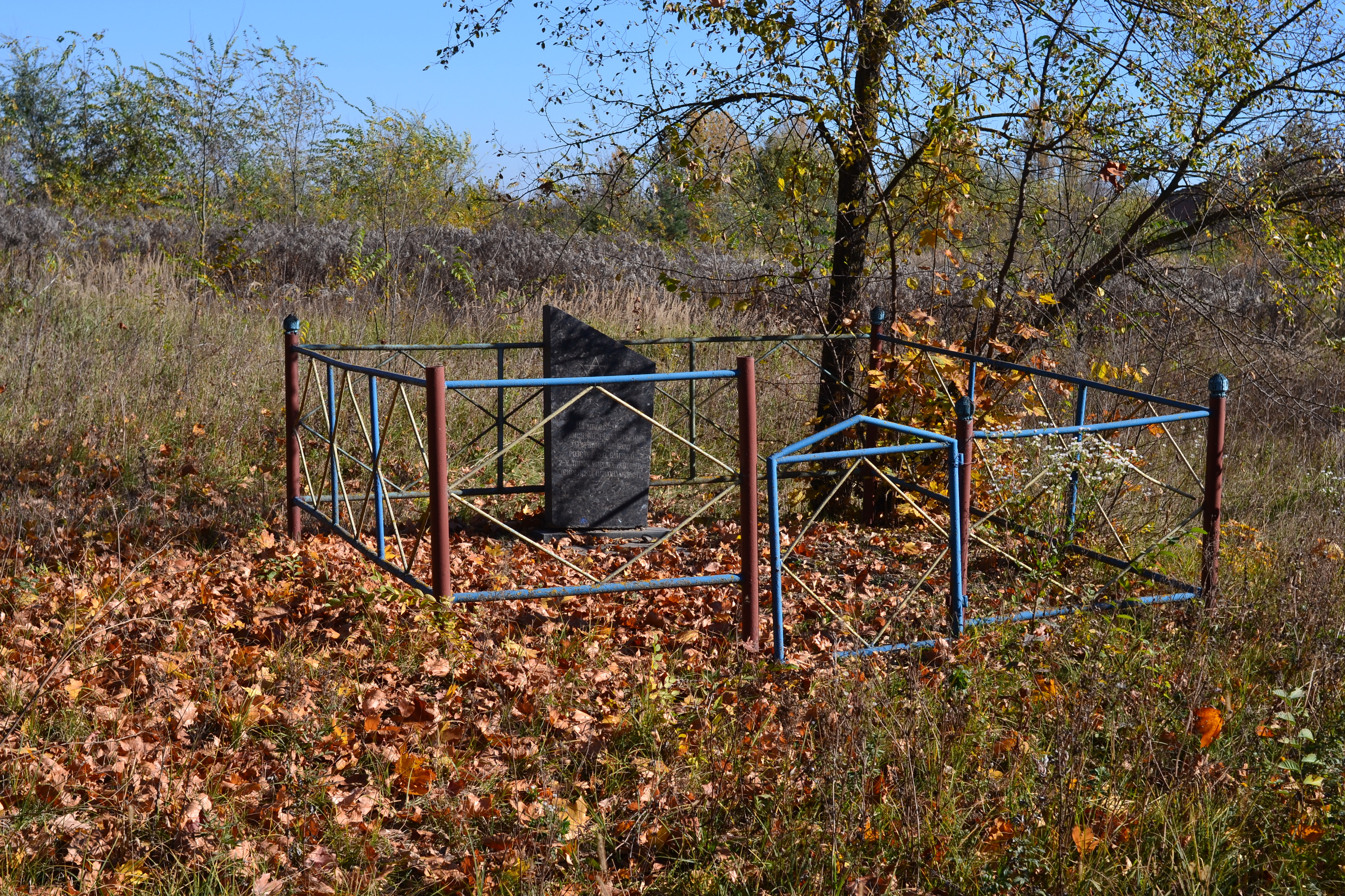 Місце масового розстрілу євреїв (1991 рік) - Переславичі (на південно-західній околиці села, біля дороги Павлівка-Горохів) Горохівський район Волинська область Україна